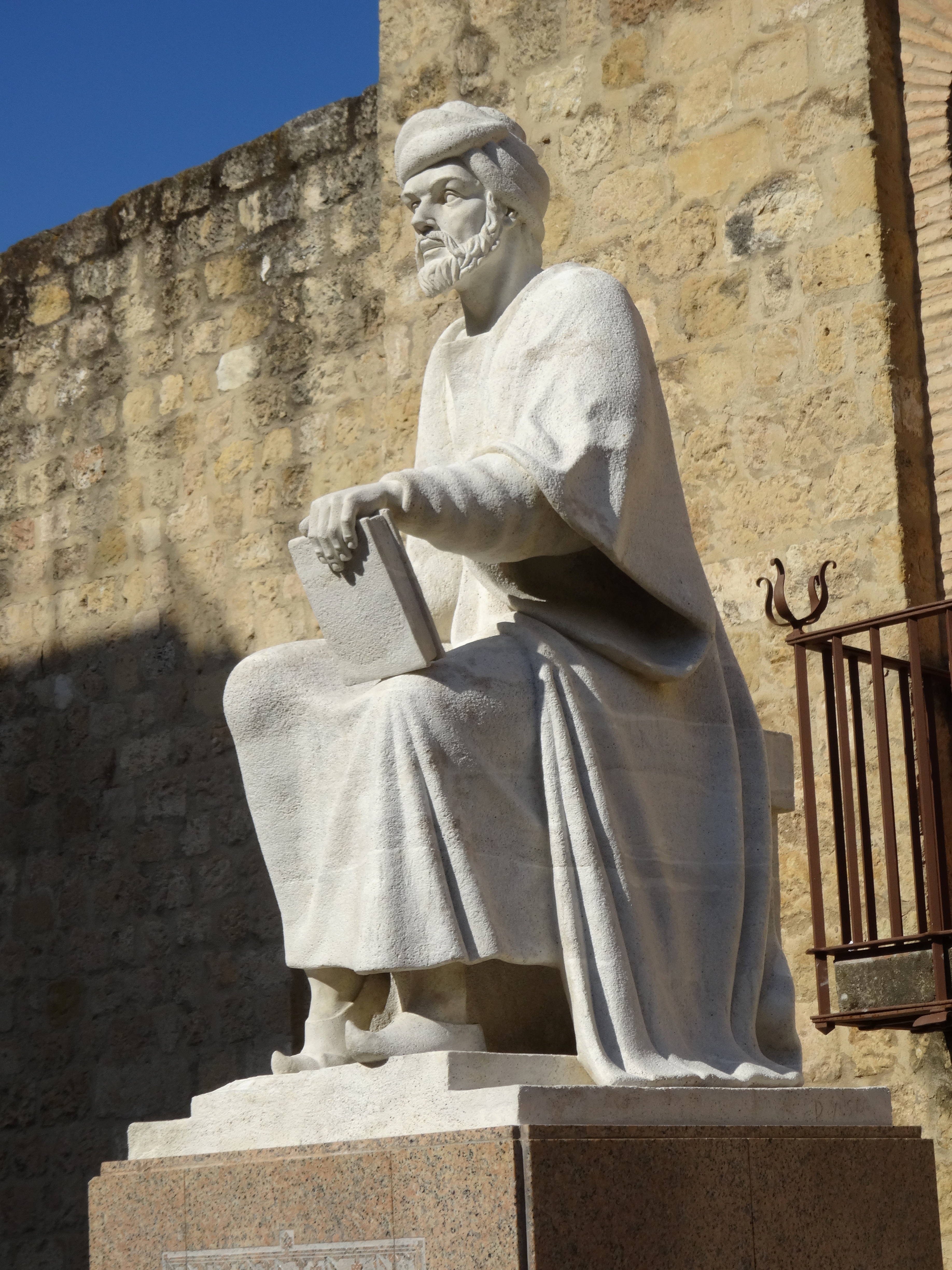 Estatua de Averrores, Córdoba (España).